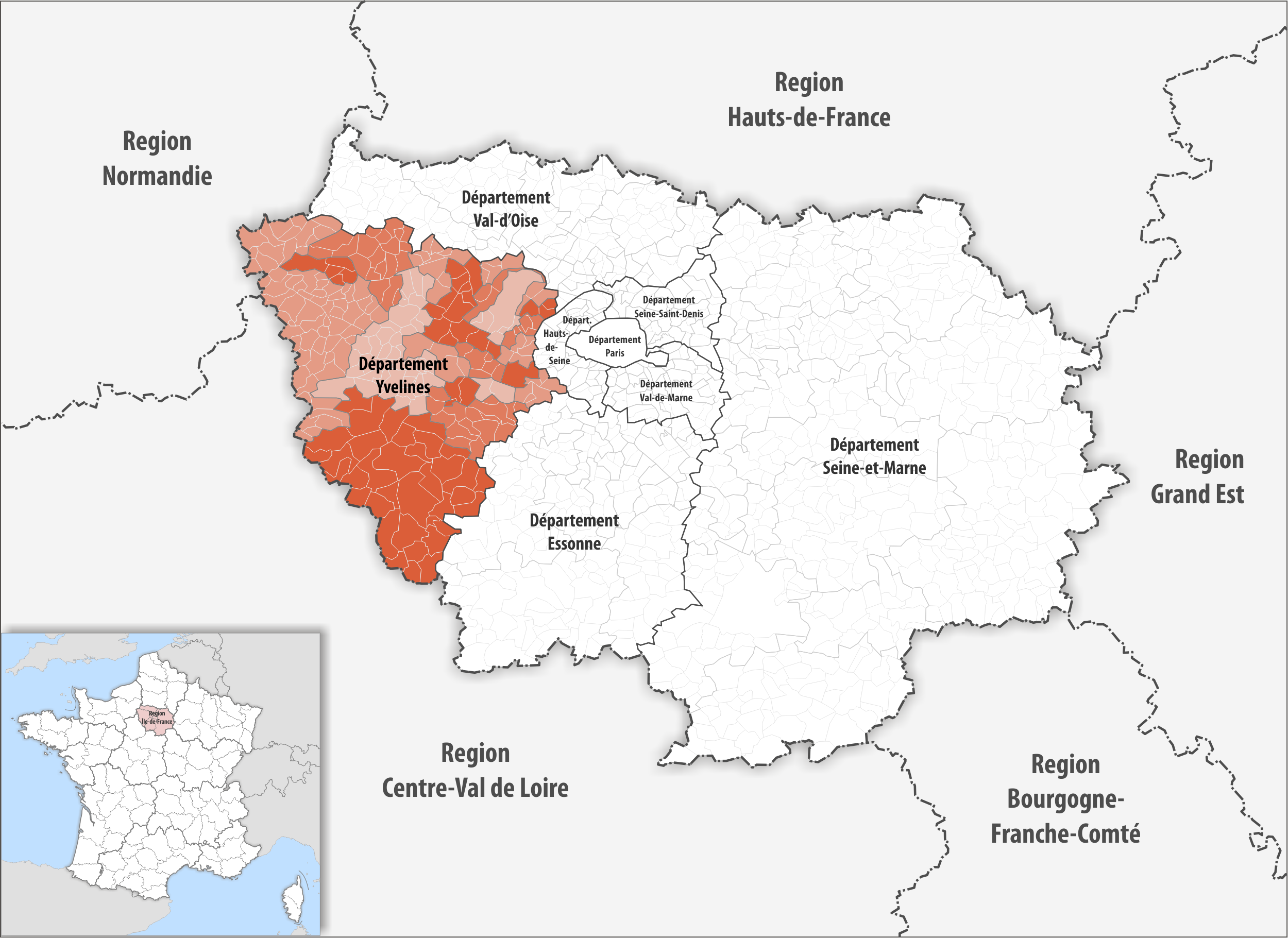 Lage des Departements Yvelines